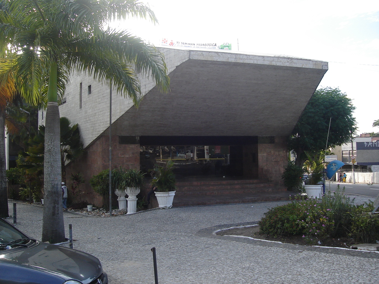 Teatro Municipal de Campina Grande, Paraíba, Brasil. Autor: Bruno Coitinho Araújo